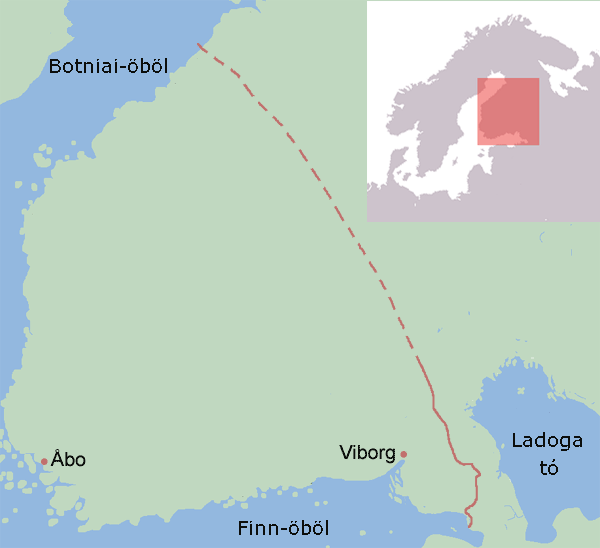 A nöteborgi béke nyomán kialakult határok